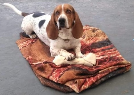 Perro macho Basset Hound con hueso de utileria.